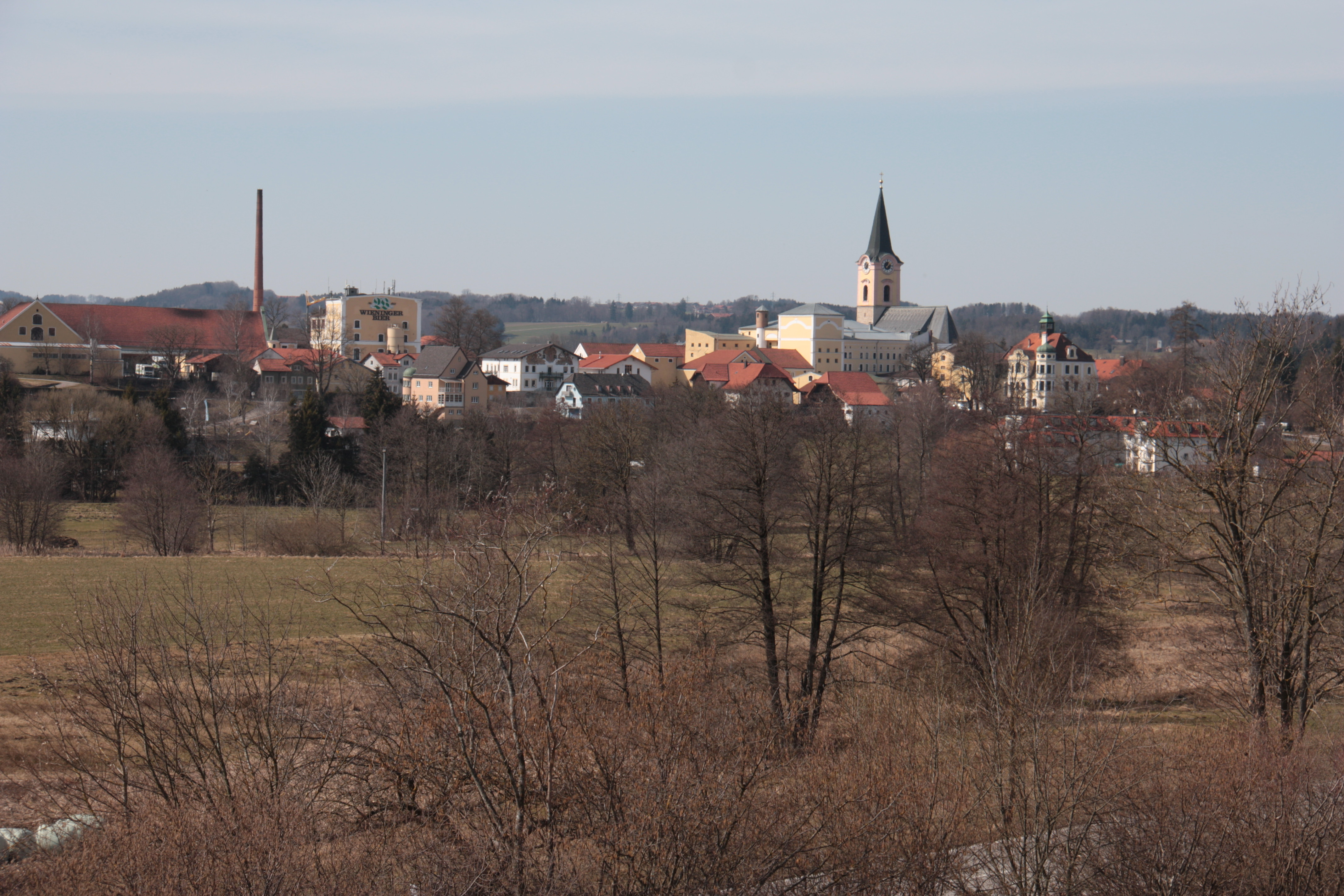 Blick auf Teisendorf